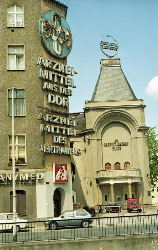 22.7.1991 Berlin, Bezirk Mitte Berliner Ensemble (Ehemalige Wirkungsstätte von Bert Brecht)